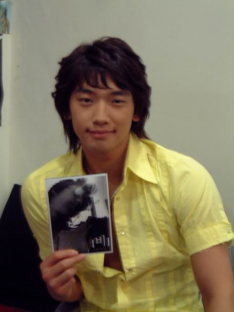 Rain (Korean Singer)